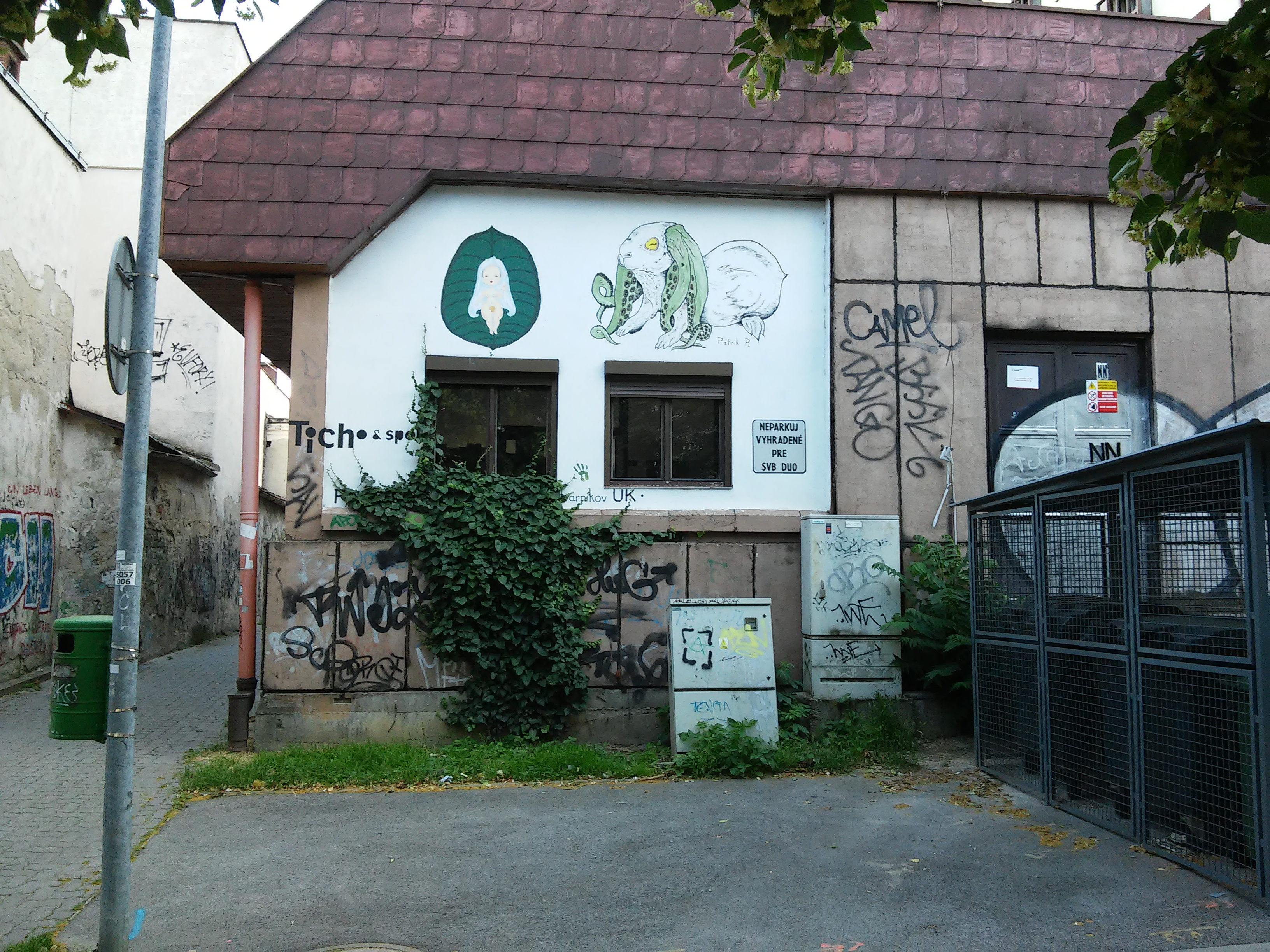 Divadlo Ticho a spol., Školská, Bratislava